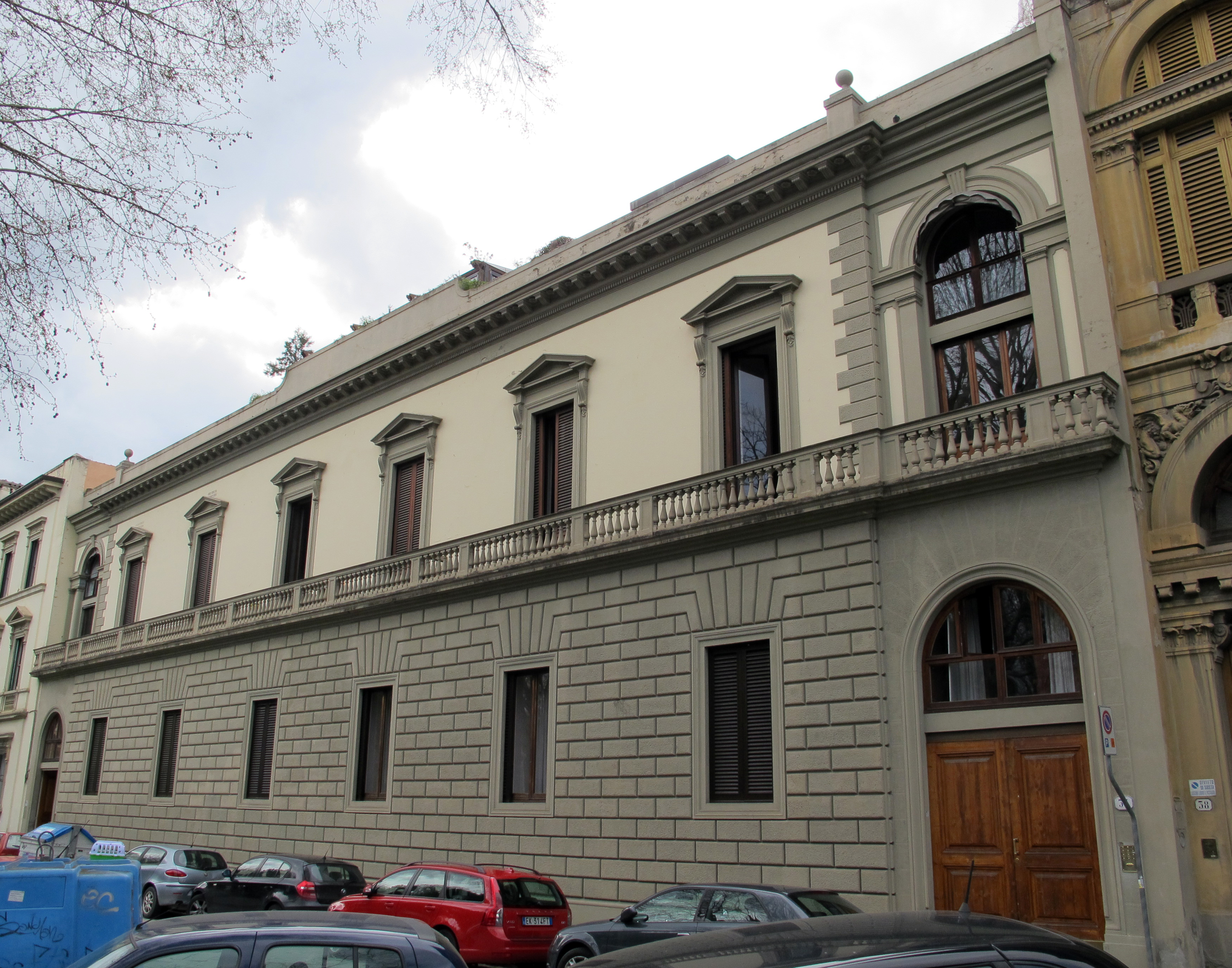 Piazza d'azeglio 36-37, palazzina uzielli